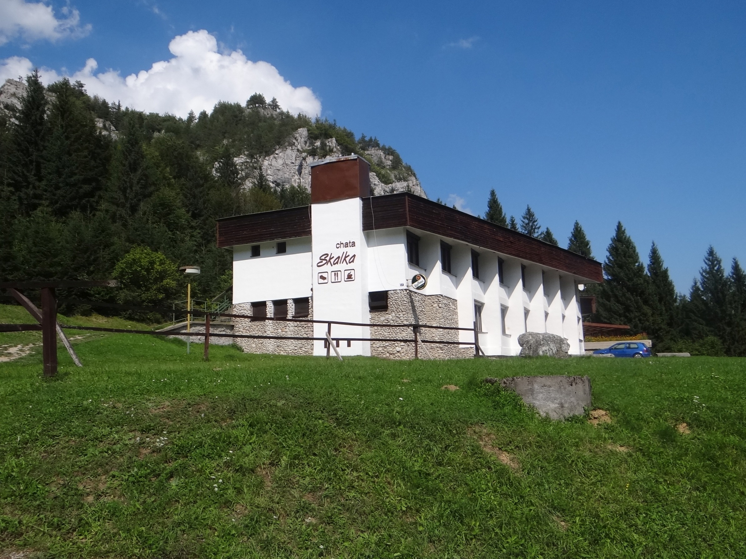 Skala Malina, Hotel Malina